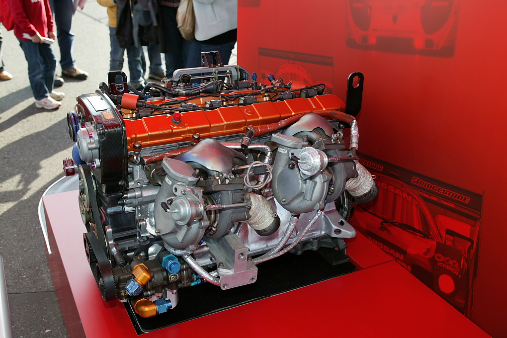 Nissan RB26DETT for JGTC, '02 FR model.